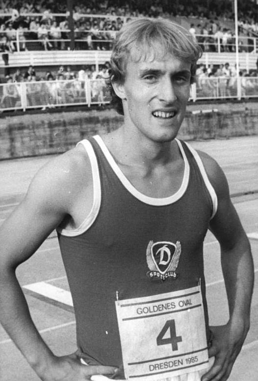 Ron Beer ADN-ZB Thieme 6.8.85 Dresden: Vorschaumotiv 36. DDR-Meisterschaften in der Leichtathletik vom 9. bis 11. August 1985 in Leipzig. Der 19jährige Weitspringer Ron Beer (SC Dynamo Berlin - Foto vom Goldenen Oval 1985 in Dresden) hofft auf den Meistertitel. In Dresden landerte er bei 8.21 m. Der Dynamo-Sportler erkämpfte 1979 vier und 1981 drei Spartakiade-Goldmedaillen. Er wird am 29. August 20 Jahre alt. Sein Vater Klaus wurde 1968 in Mexiko mit 8.19 m Silbermedaillengewinner der Olympischen Sommerspiele.